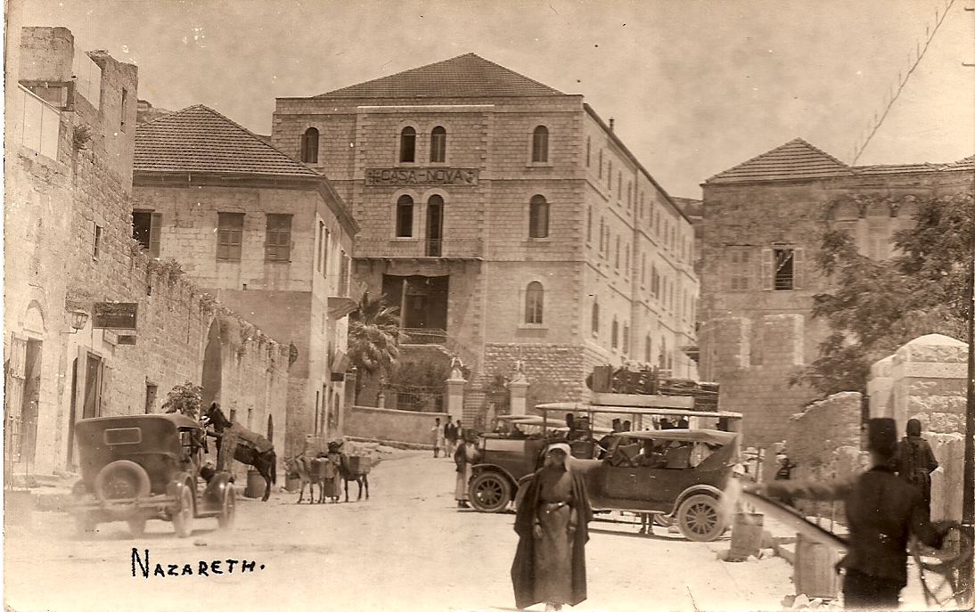 Nazareth, Casa Nova